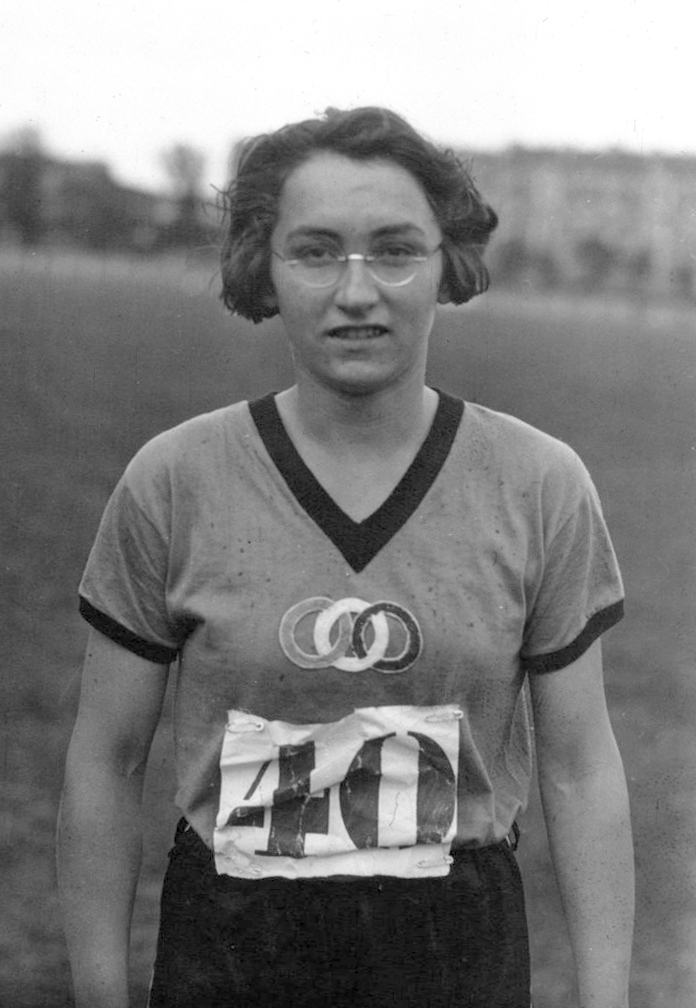 Stade Jean Bouin : Championnat de France d'athlétisme : Radideau (portrait à 2 m) : [photographie de presse] / Agence Meurisse